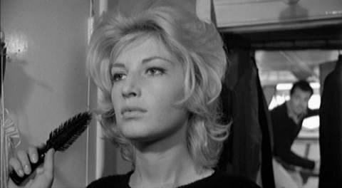 Képkocka „A kaland” című filmből